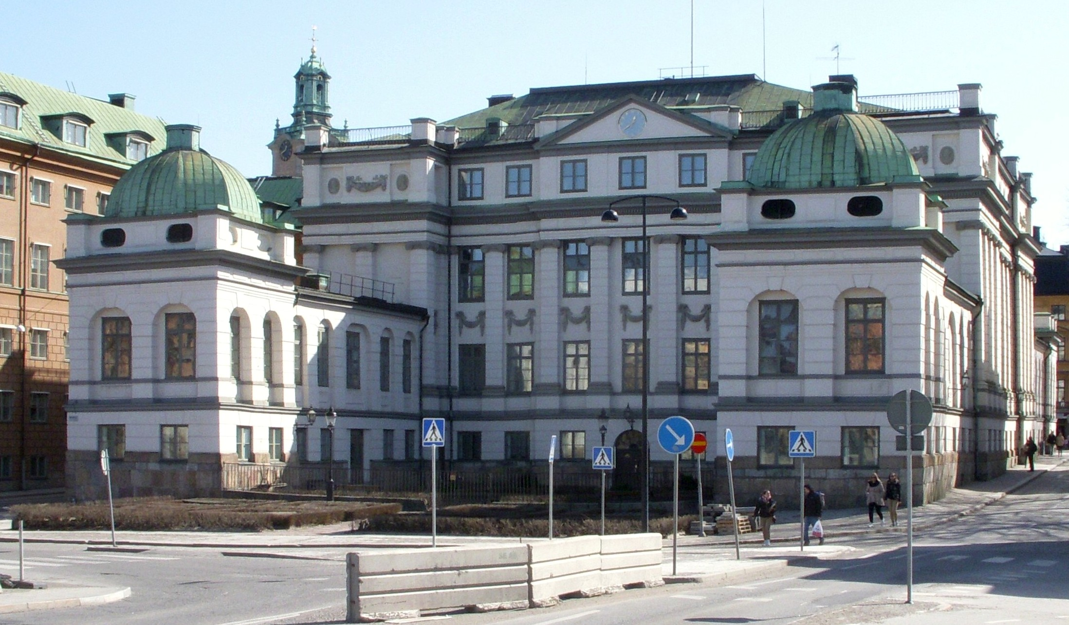 Bondeska palatset, vy från norr och Vasabron